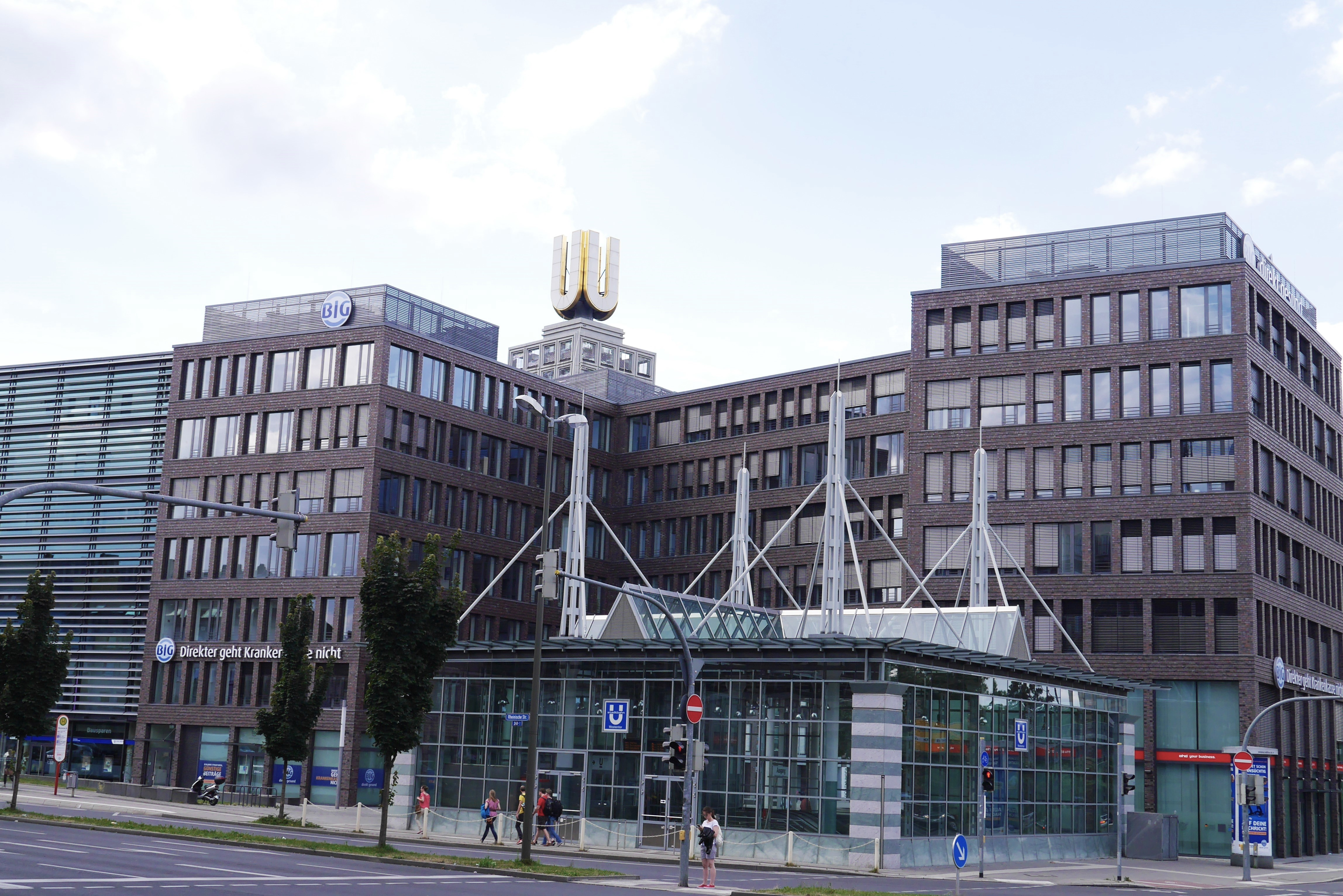 BIG Direktkrankenkasse an der Stadtbahn-Haltestelle Dortmund-Westentor. Im Hintergrund das Dortmunder U.